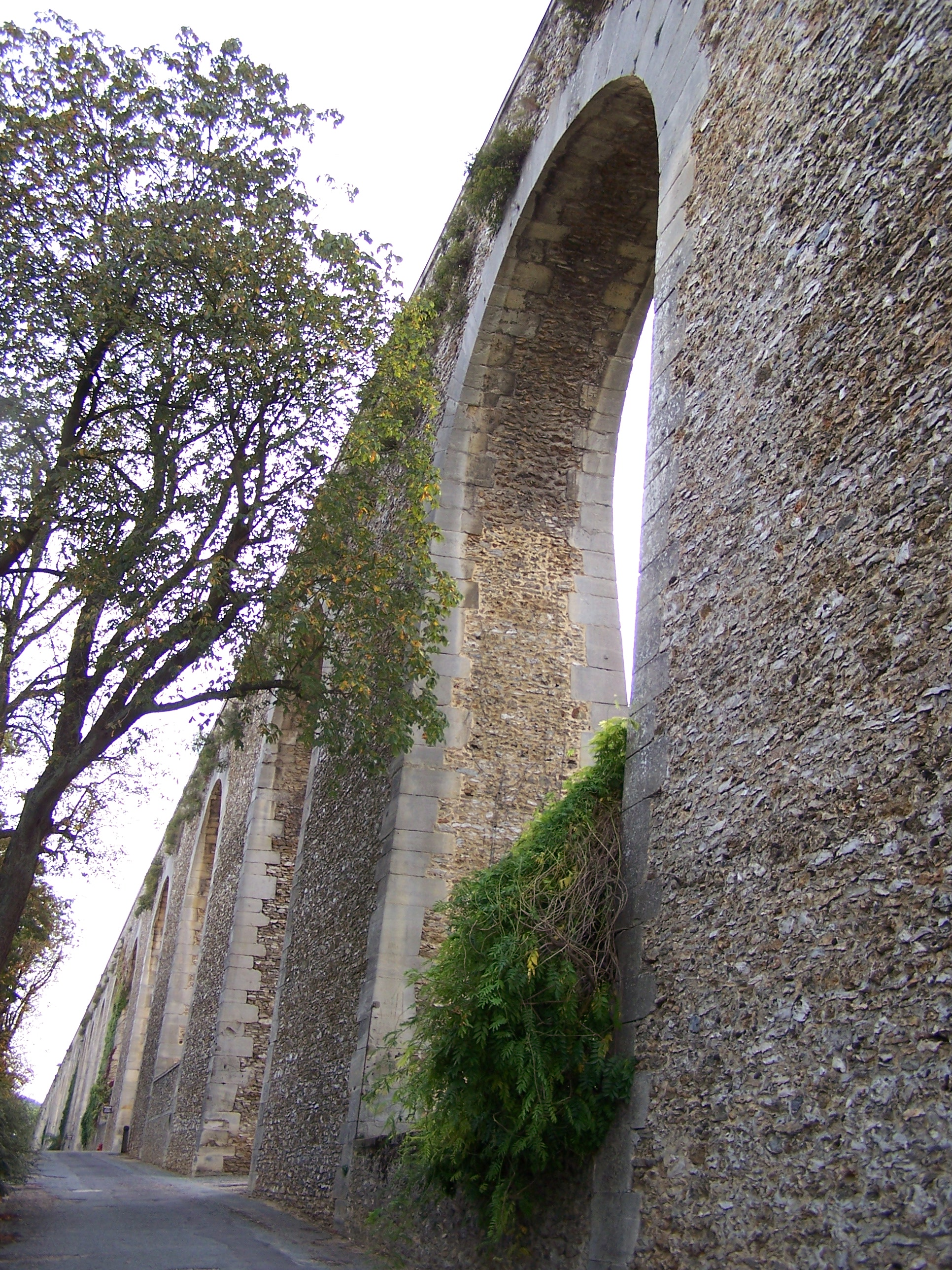 Aqueduc de Marly à Louveciennes (Yvelines, France). Photo personnelle. Aqueduct of Marly in Louveciennes (Yvelines, France). Personal photo. Auteur/Author : ℍenry Salomé